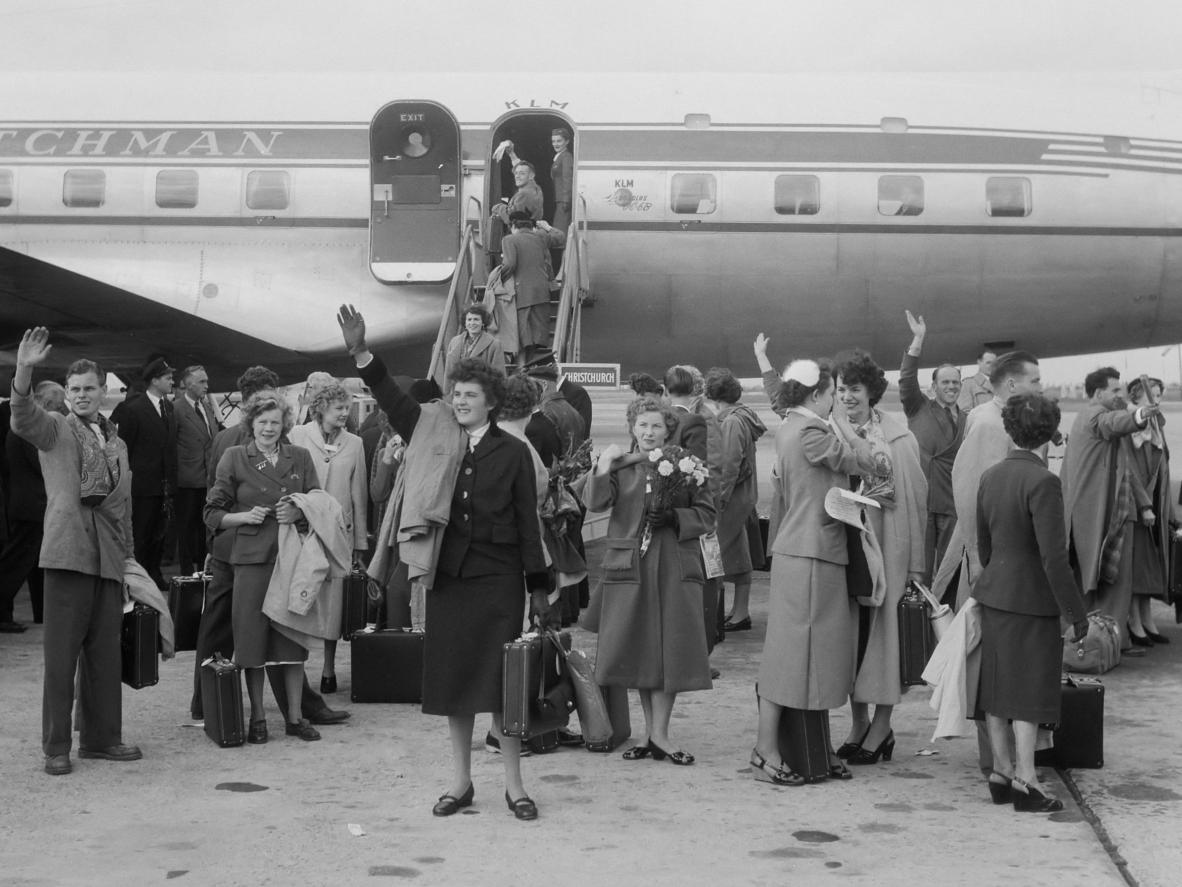 Vertrek KLM DC 6A Liftmaster "Dr. Ir. M.A. Damme" naar Christchurch. Deelnemer aan de London-Christchurch Canterbury Centennial Air Race. De passagiers van het vliegtuig, waaronder een vijftigtal bruiden die naar hun toekomstige echtgenoten zullen vliegen